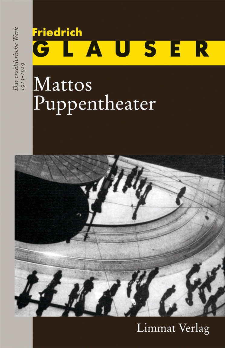 Cover von "Mattos Puppentheater - Erzählungen 1" (Werkausgabe des Limmat Verlages)